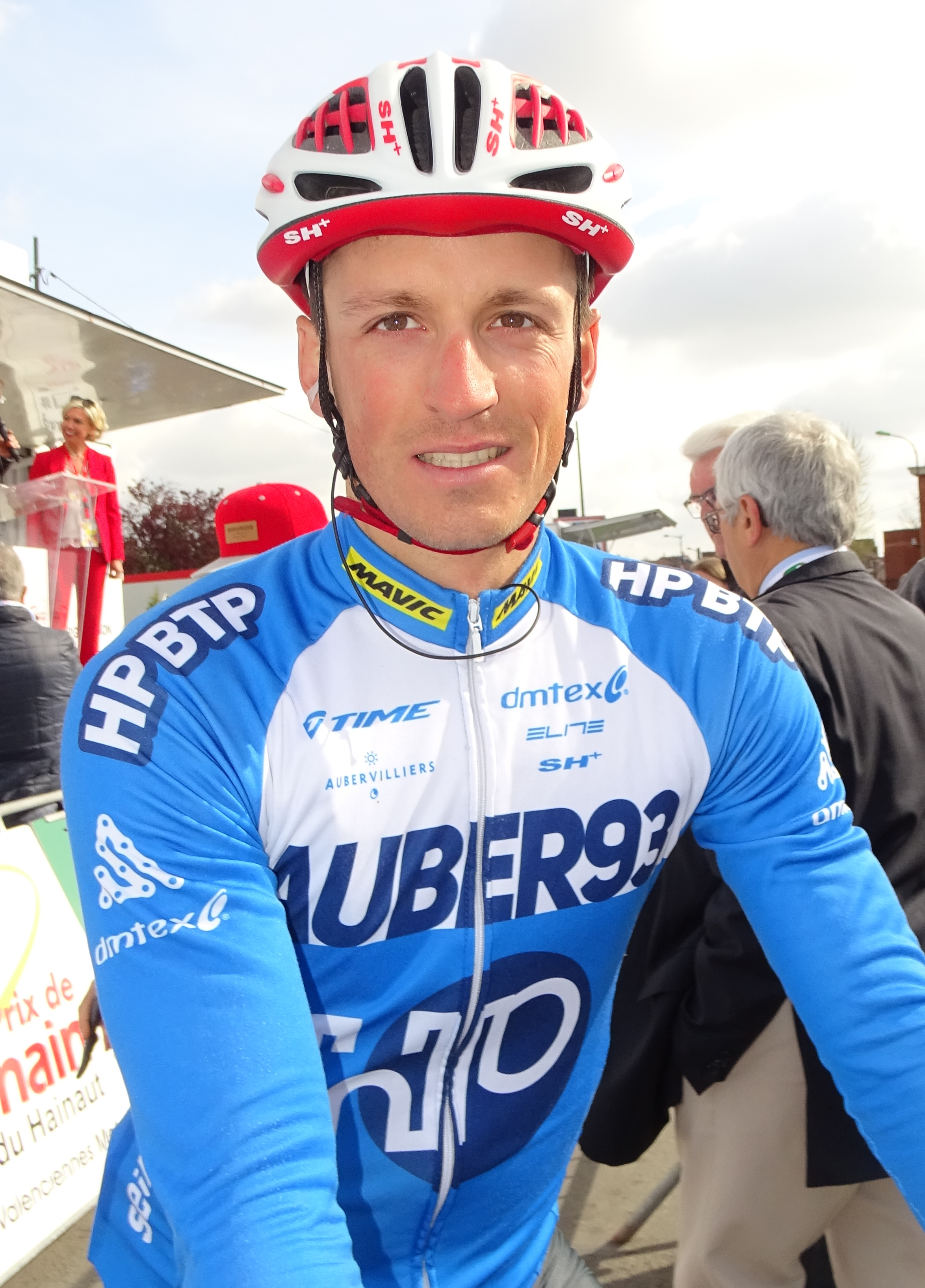 Reportage réalisé le jeudi 13 avril à l'occasion du départ et de l'arrivée du Grand Prix de Denain 2017 à Denain, Nord, Nord-Pas-de-Calais-Picardie, France.